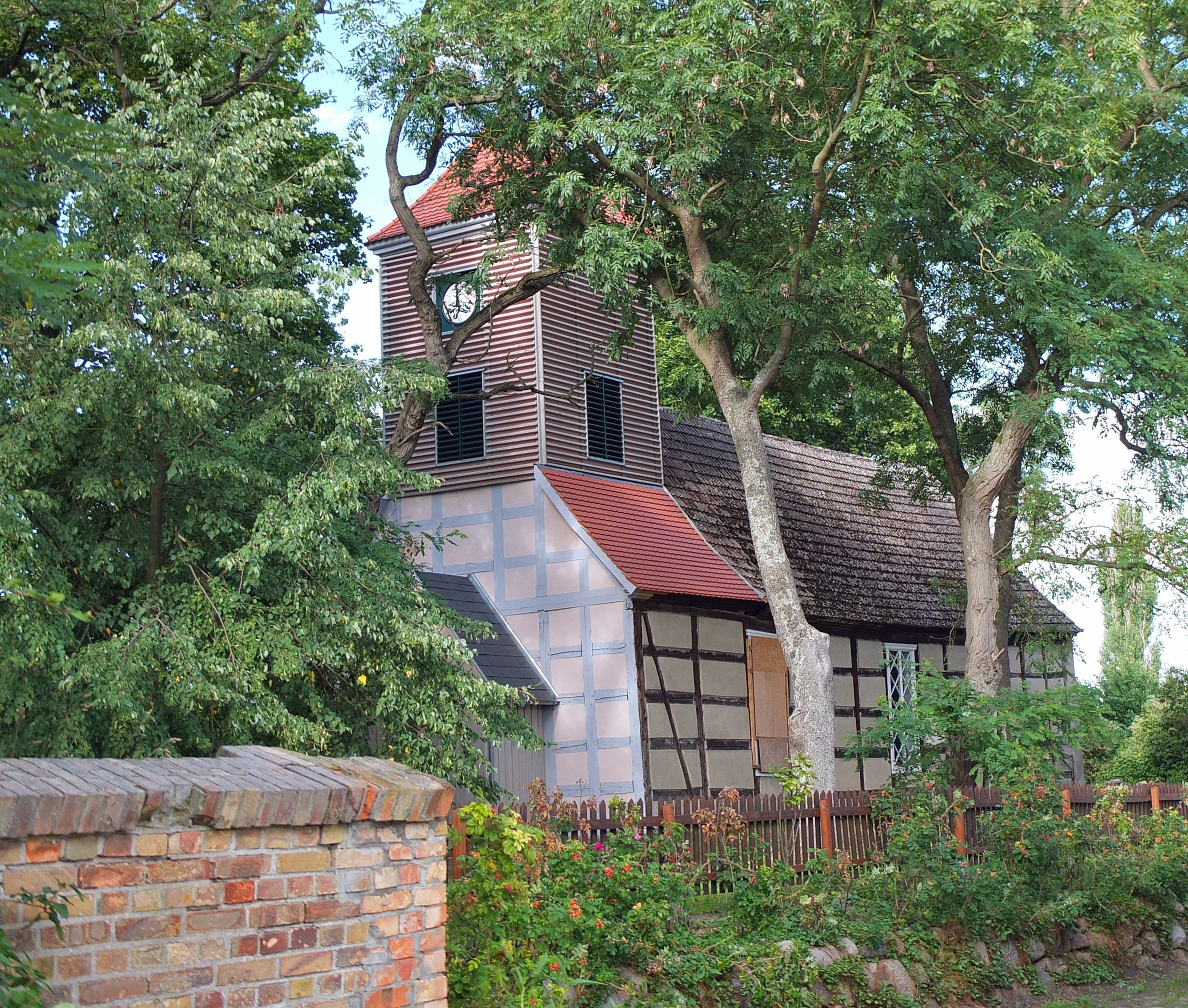 Denkmalgeschützte Dorfkirche in Seehausen (Gemeinde Oberuckersse, Landkreis Uckermark, Land Brandenburg, Deutschland)